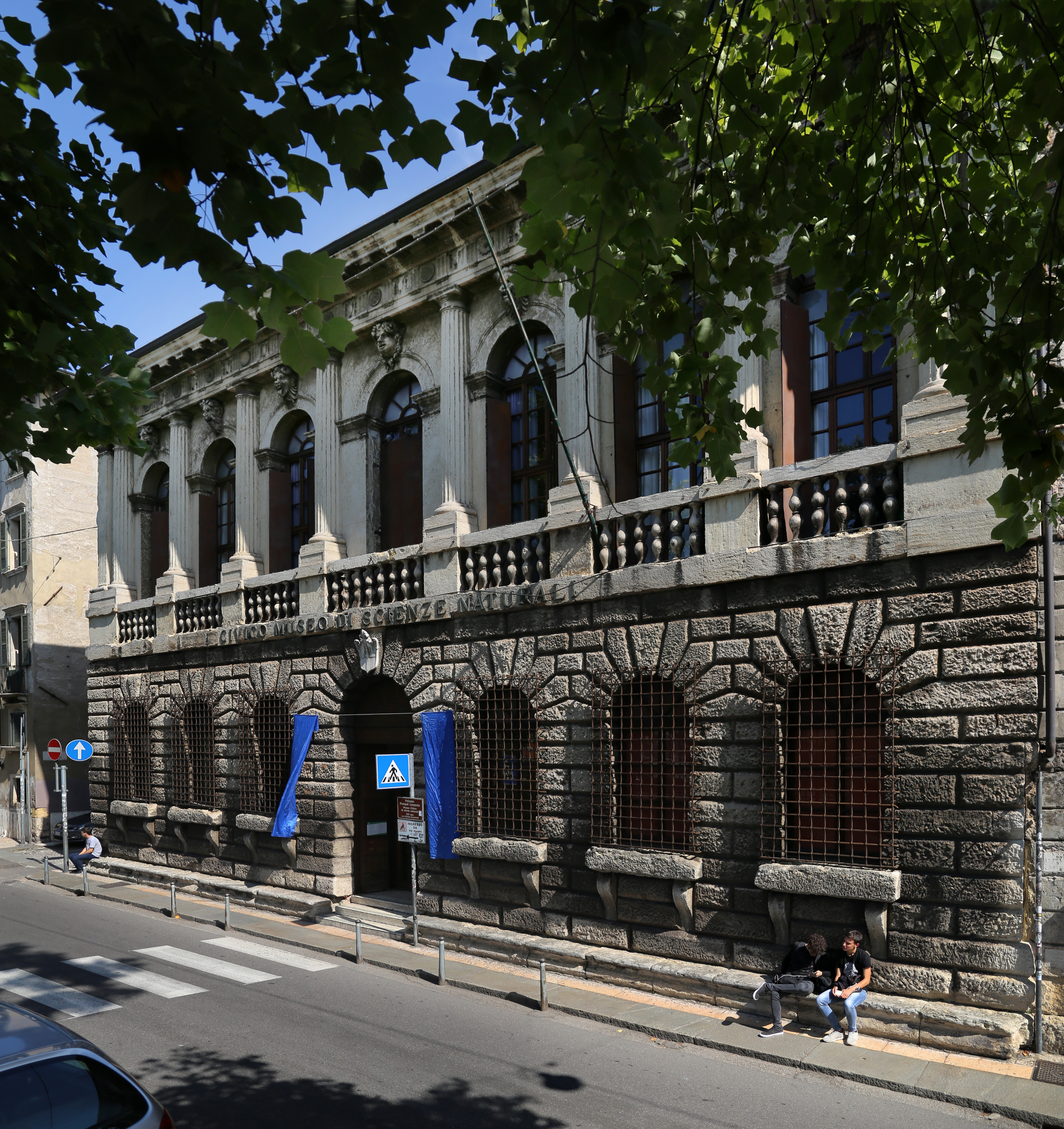 Palazzo Pompei This is a photo of a monument which is part of cultural heritage of Italy.